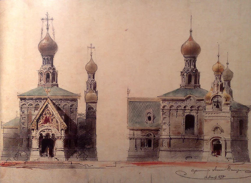 Entwurfsskizze der Außenfassade der Russischen Kapelle in Darmstadt von Leon Benois.